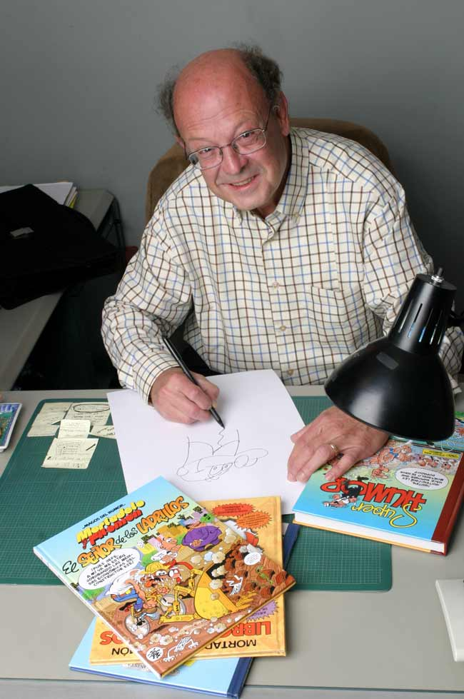 Entrevista a Francisco Ibáñez, creador de Mortadelo y Filemón, entre otros.